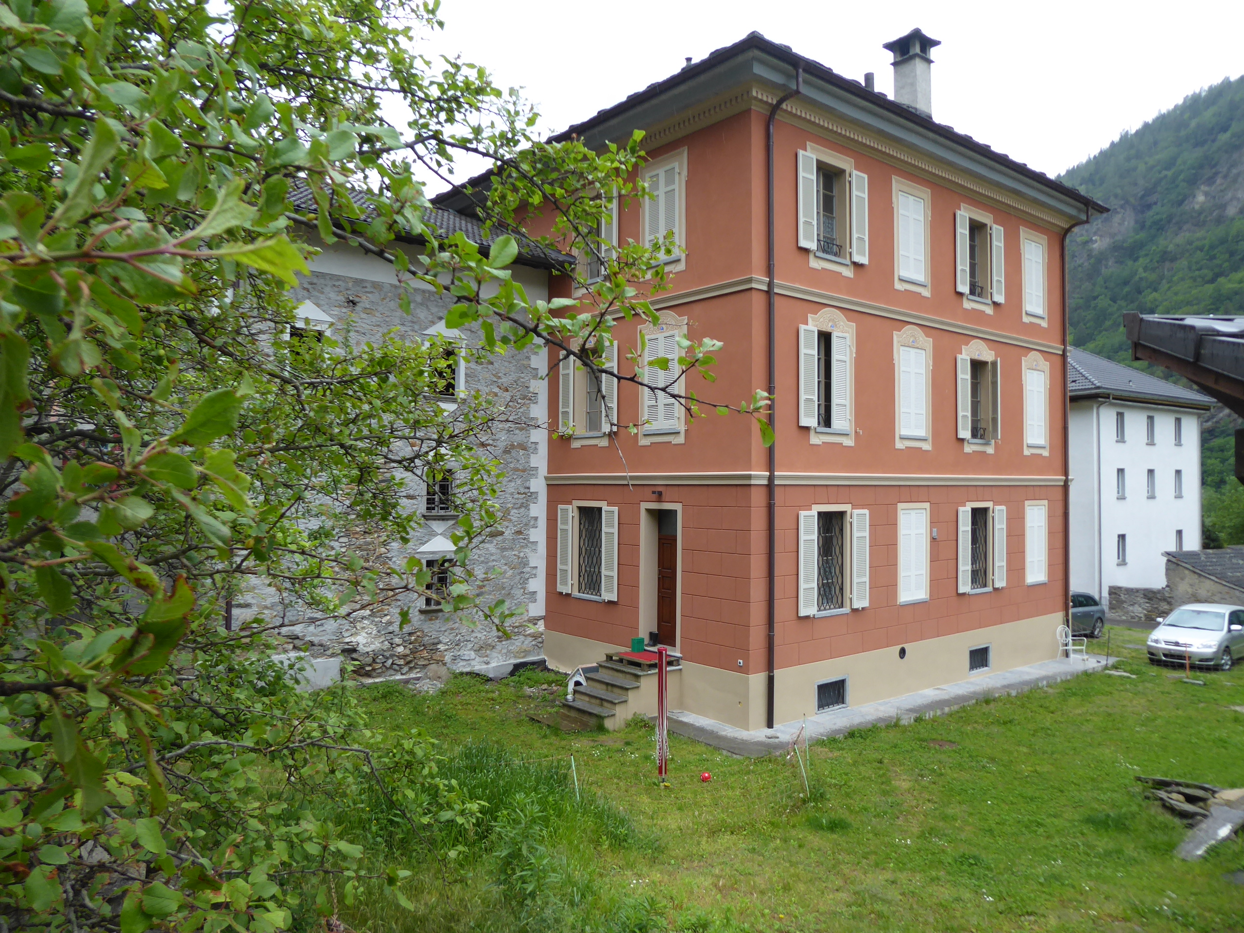 Die Villa des schweizerisch-englischen Unternehmers Carlo Gatti in Dongio-Marogno.